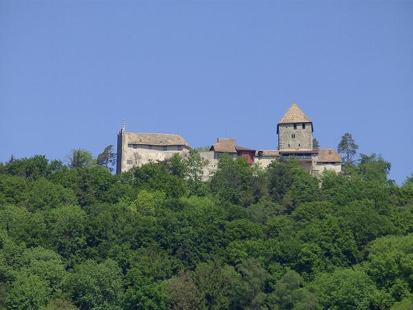 Burg Hohenklingen